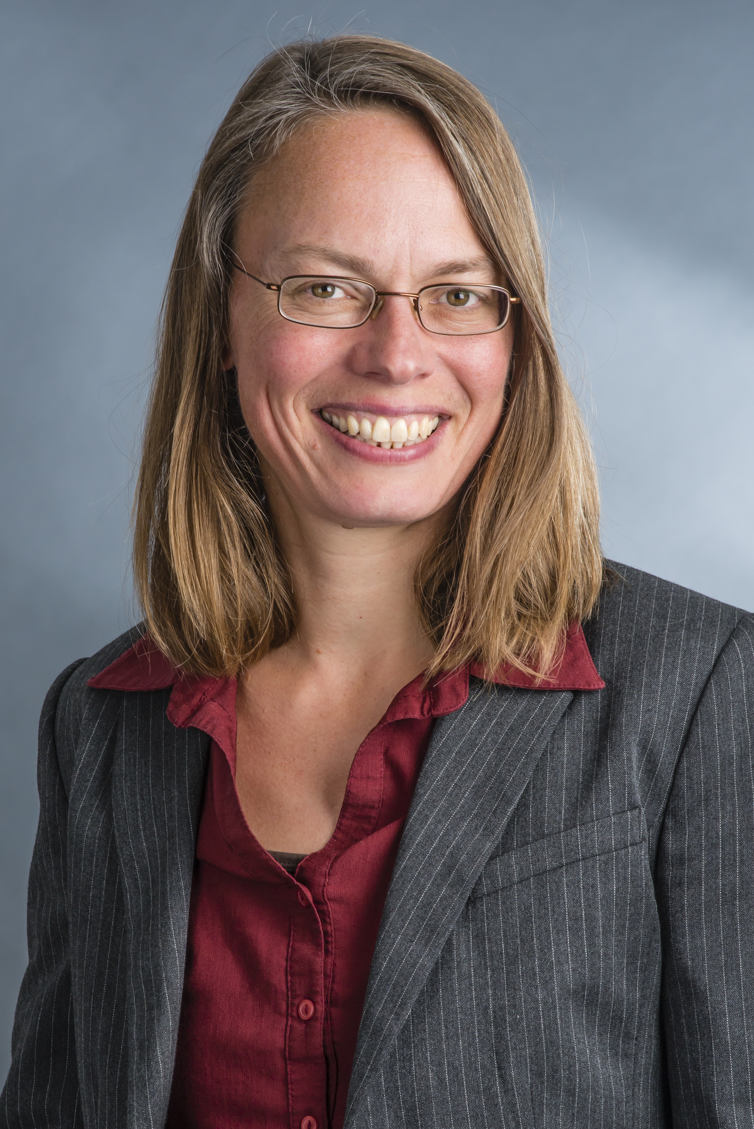 Sascha Karolin Aulepp (* 24. September 1970 in Hanau) ist eine deutsche Juristin, Bremer Politikerin (SPD) und seit 2015 Mitglied der Bremischen Bürgerschaft.